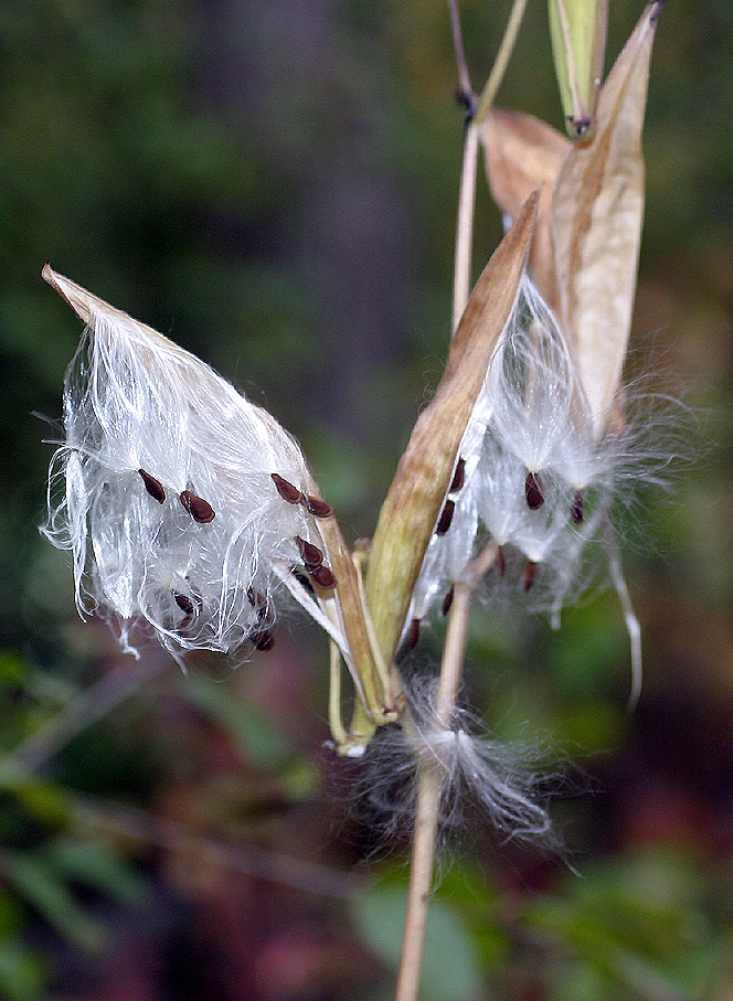 Swamp Milkweed fruit and seeds.